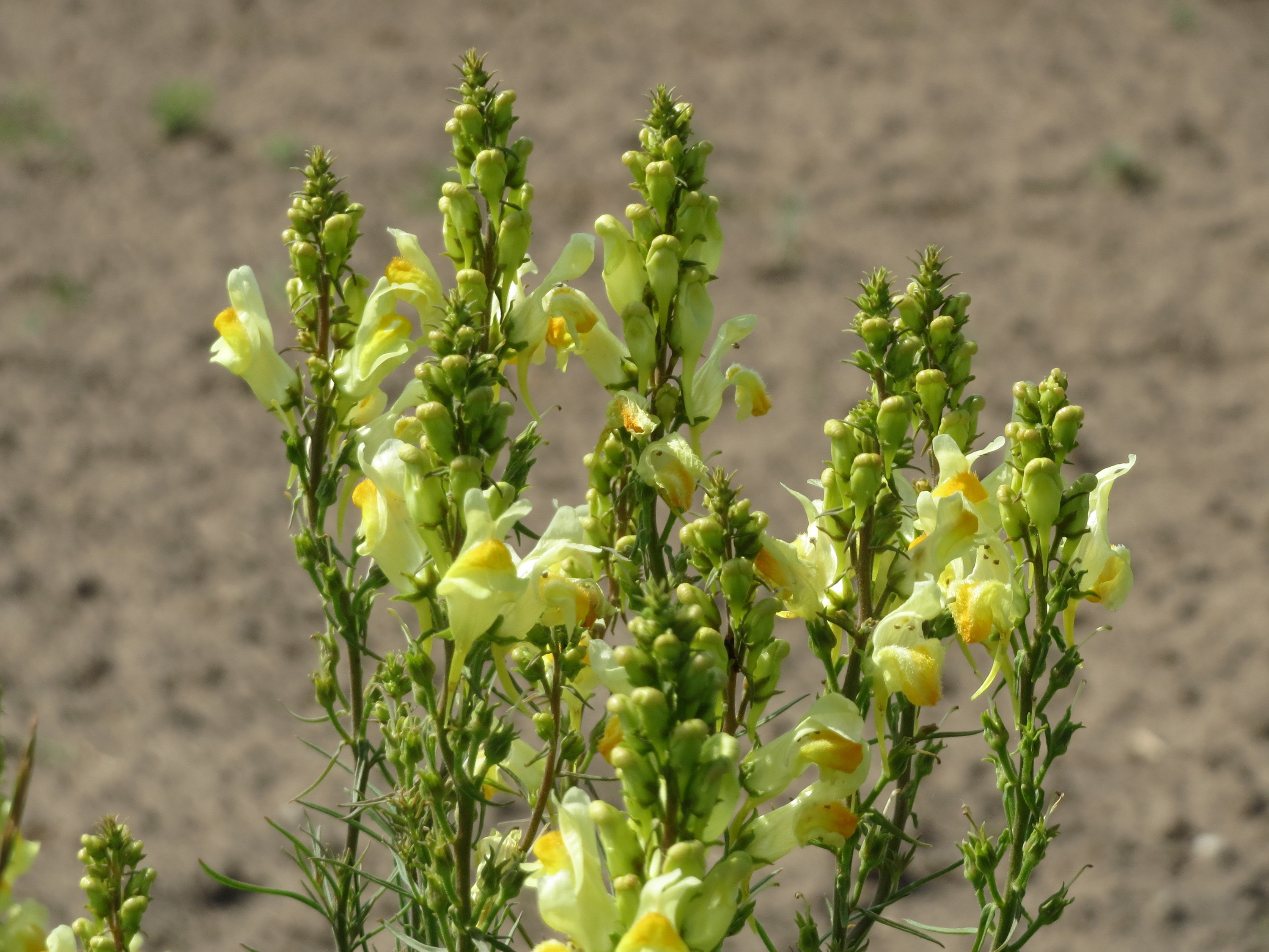 Echtes Leinkraut (Linaria vulgaris) bei Reilingen